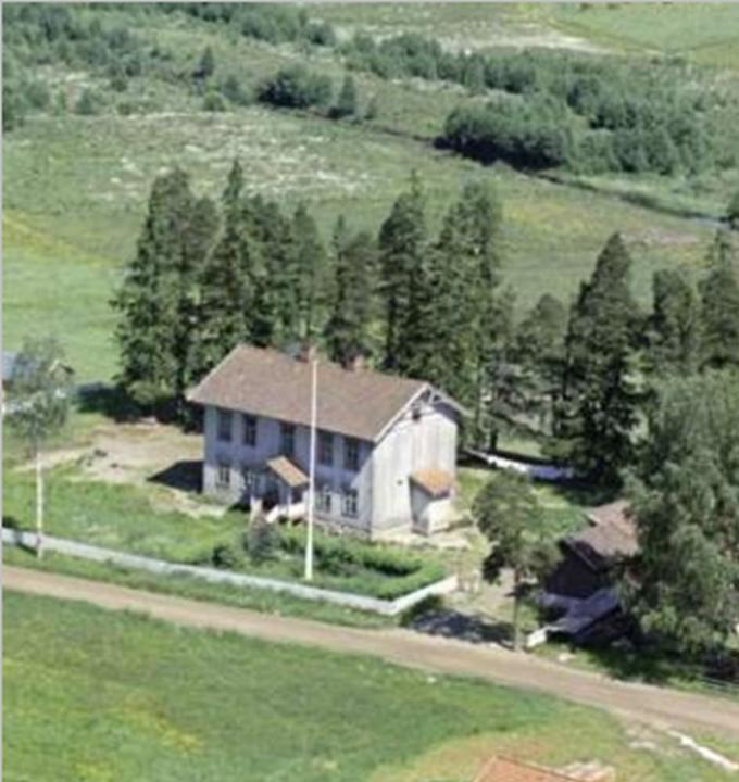 Bildets eier Akershusmuseet v/ Atilla Moen-Duran har godkjent bruk av bildet. Bildet er mer enn 50 år gammelt, og kan ikke betraktes som kunstverk, slik at bildet kan ansees som copyrightfritt. Bildet viser Haneborg gamle skole fra 1961.